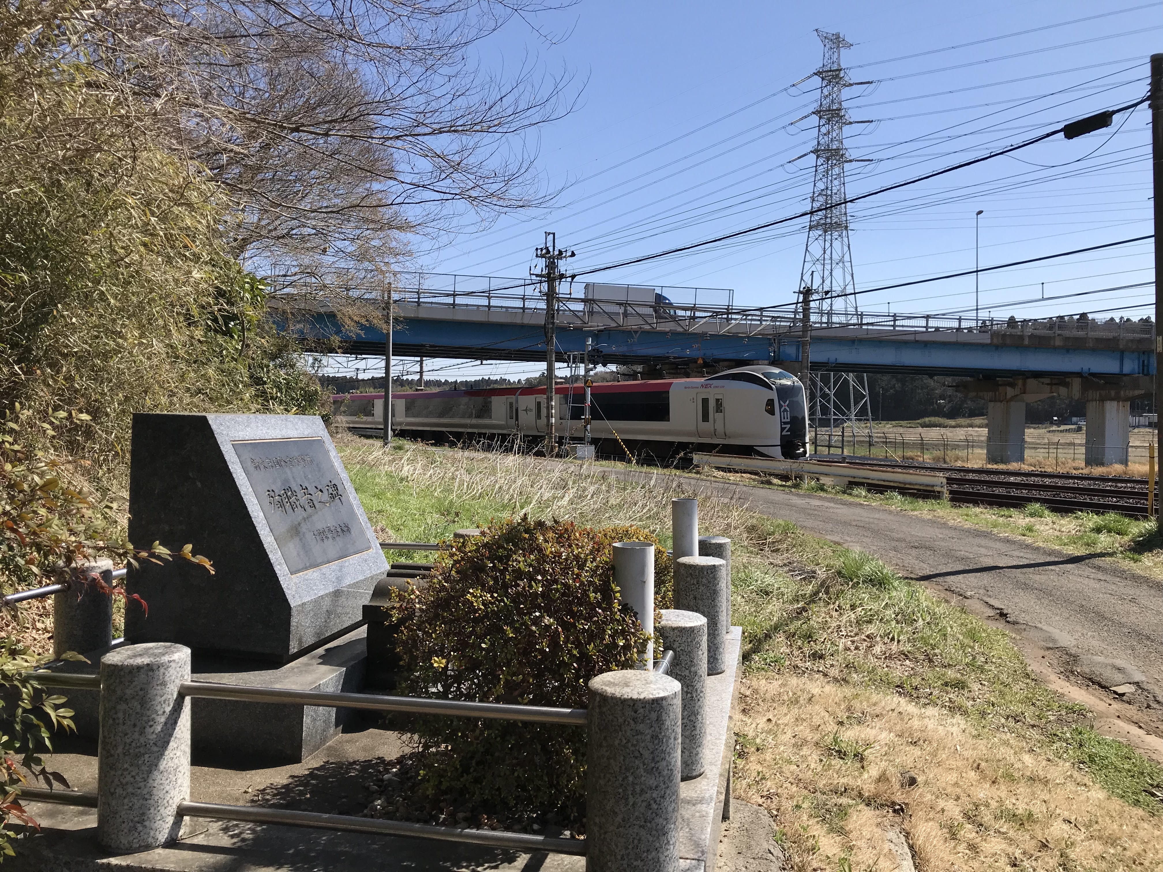 「新東京国際空港 殉職者之碑 千葉県警察本部」 1978年6月19日に発生したヘリコプター墜落事故の殉職者の慰霊碑。ヘリコプターは新東京国際空港（現・成田国際空港）への航空燃料の暫定輸送を行っていた貨物列車への過激派による襲撃を警戒していた。裏面には犠牲になった警察官1名・鉄道公安職員2名・日本農林ヘリコプター社員2名の名前が記されている。